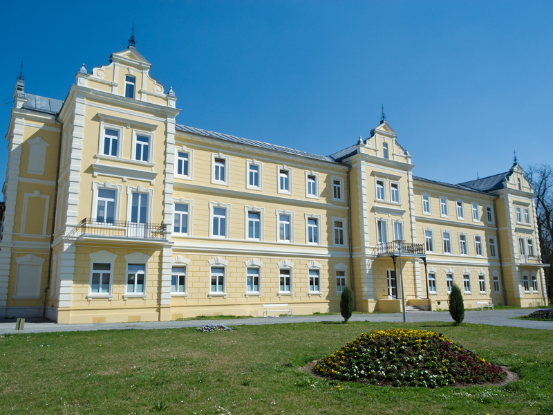 Lipik